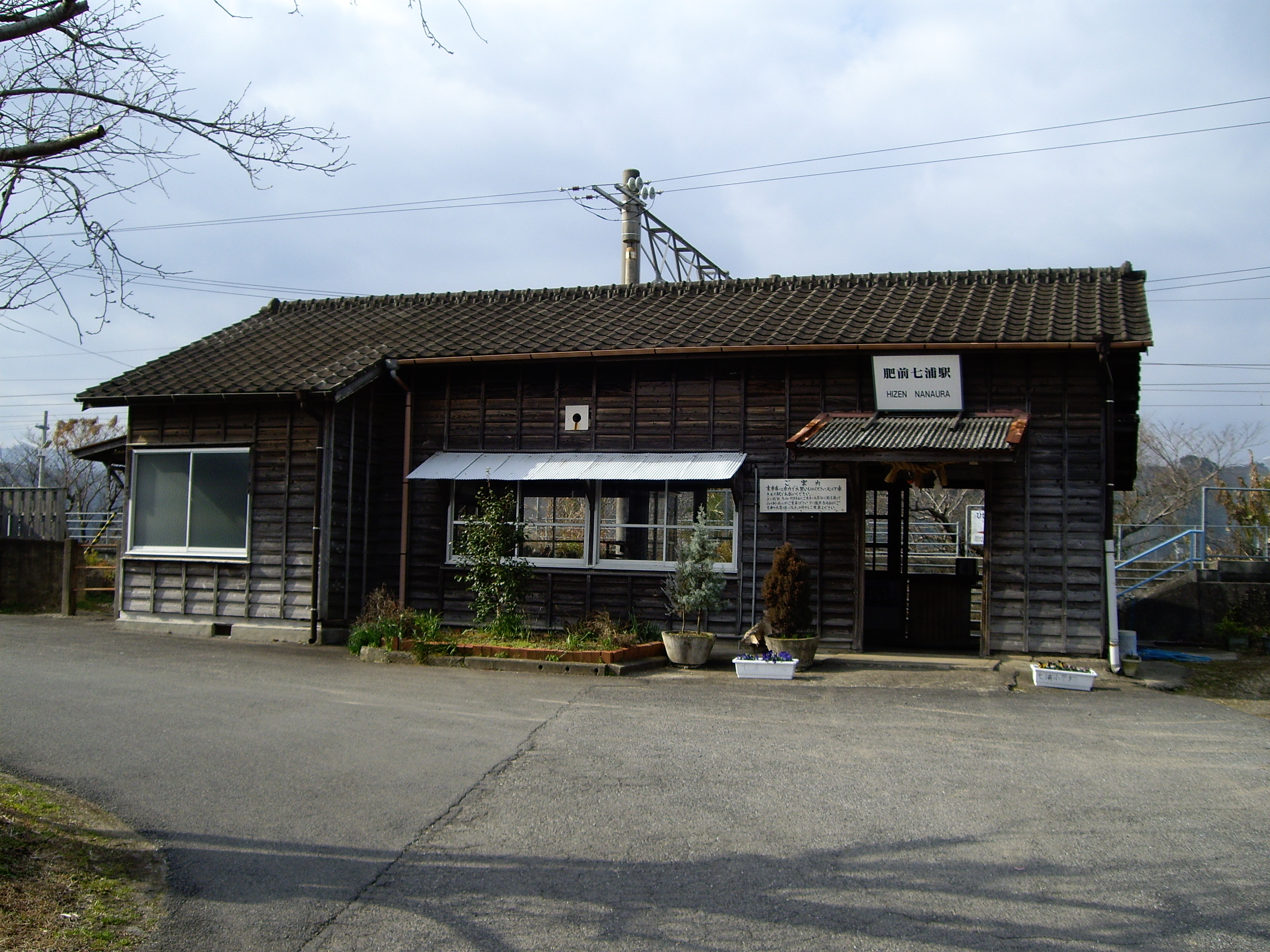 Hizen-Nanaura Station(肥前七浦駅)